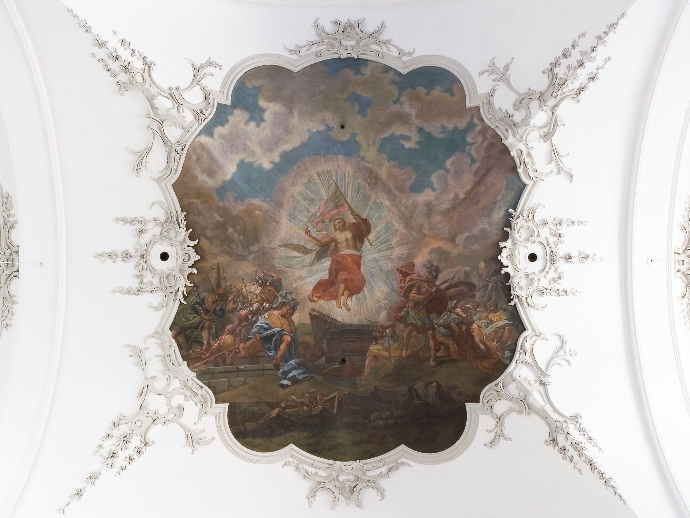 Gemälde im Gewölbesattel der Kirche in Schwyz